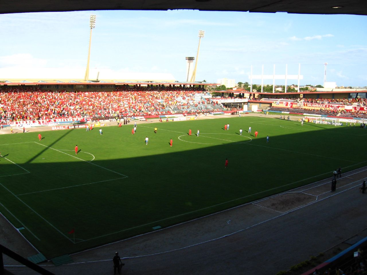 Estádio Rei Pelé: CRB x Avaí pela Série B